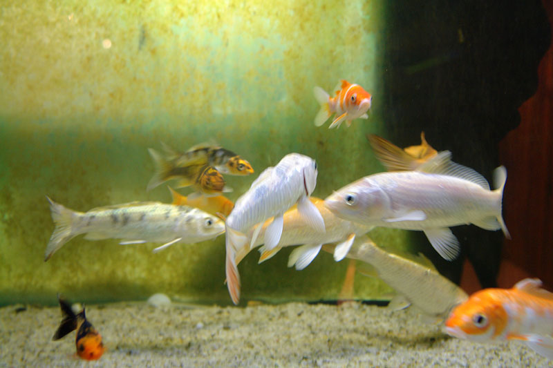 თბილისის ზოოპარკის აკვარიუმი.